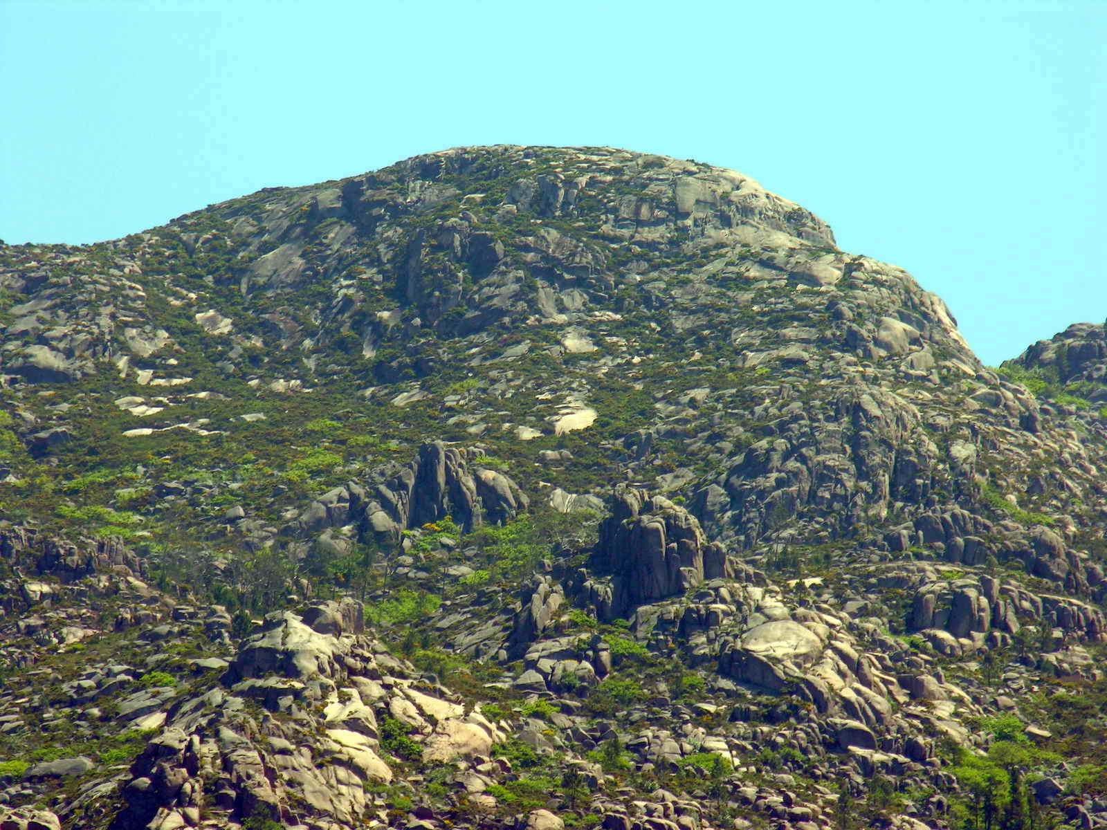 O Pindo - Galicia - Spain